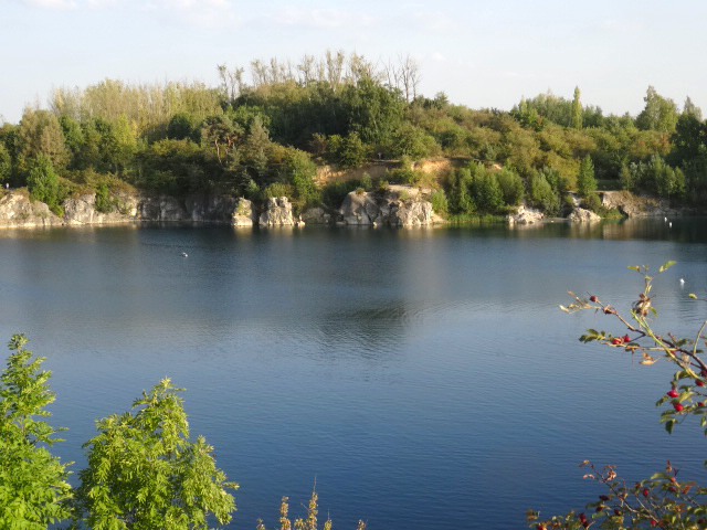 Jezioro Turkusowe w Piechcinie powstałe w dawnym kamieniołomie wapienia